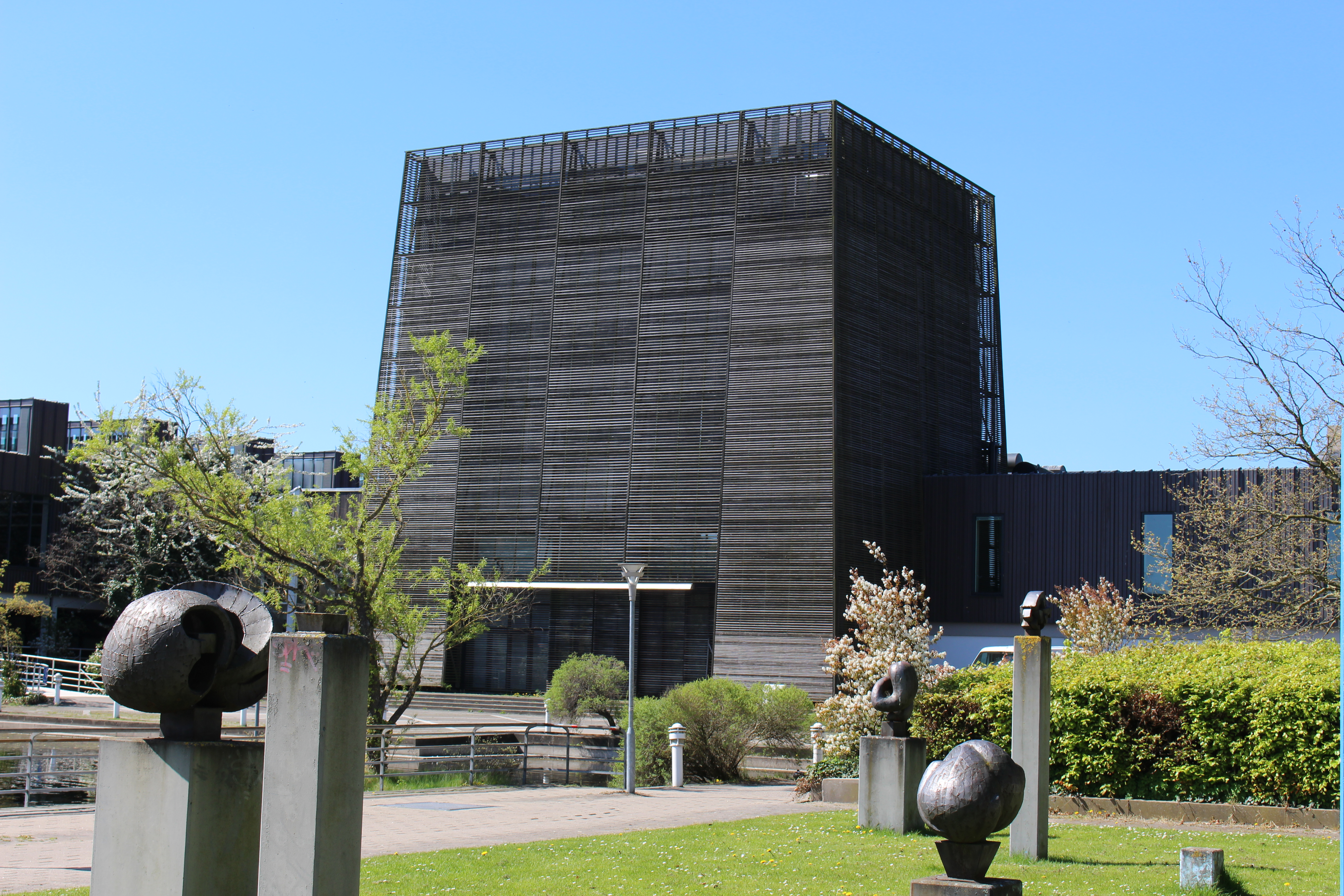 Musikteatret i Alberslund